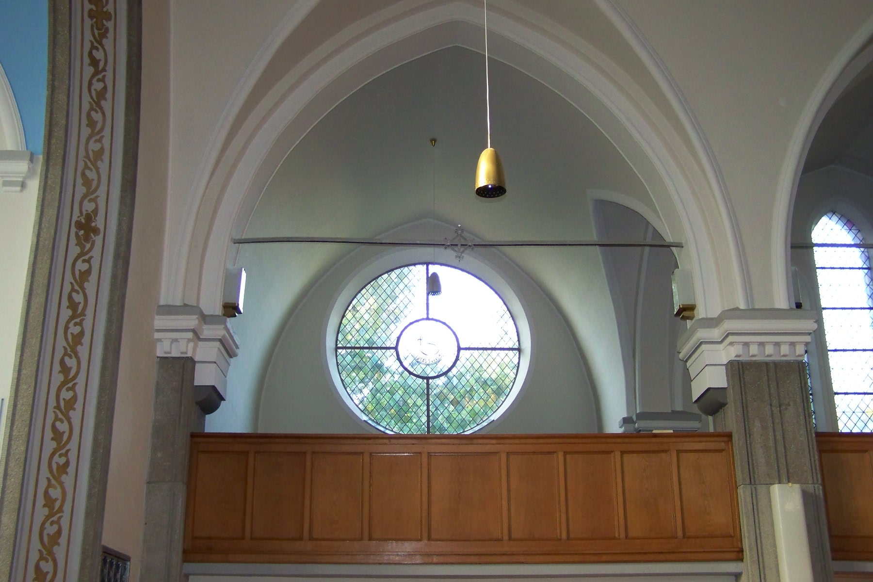 Erkner, Genezareth-Kirche, Rundfenster (2008-09-24)